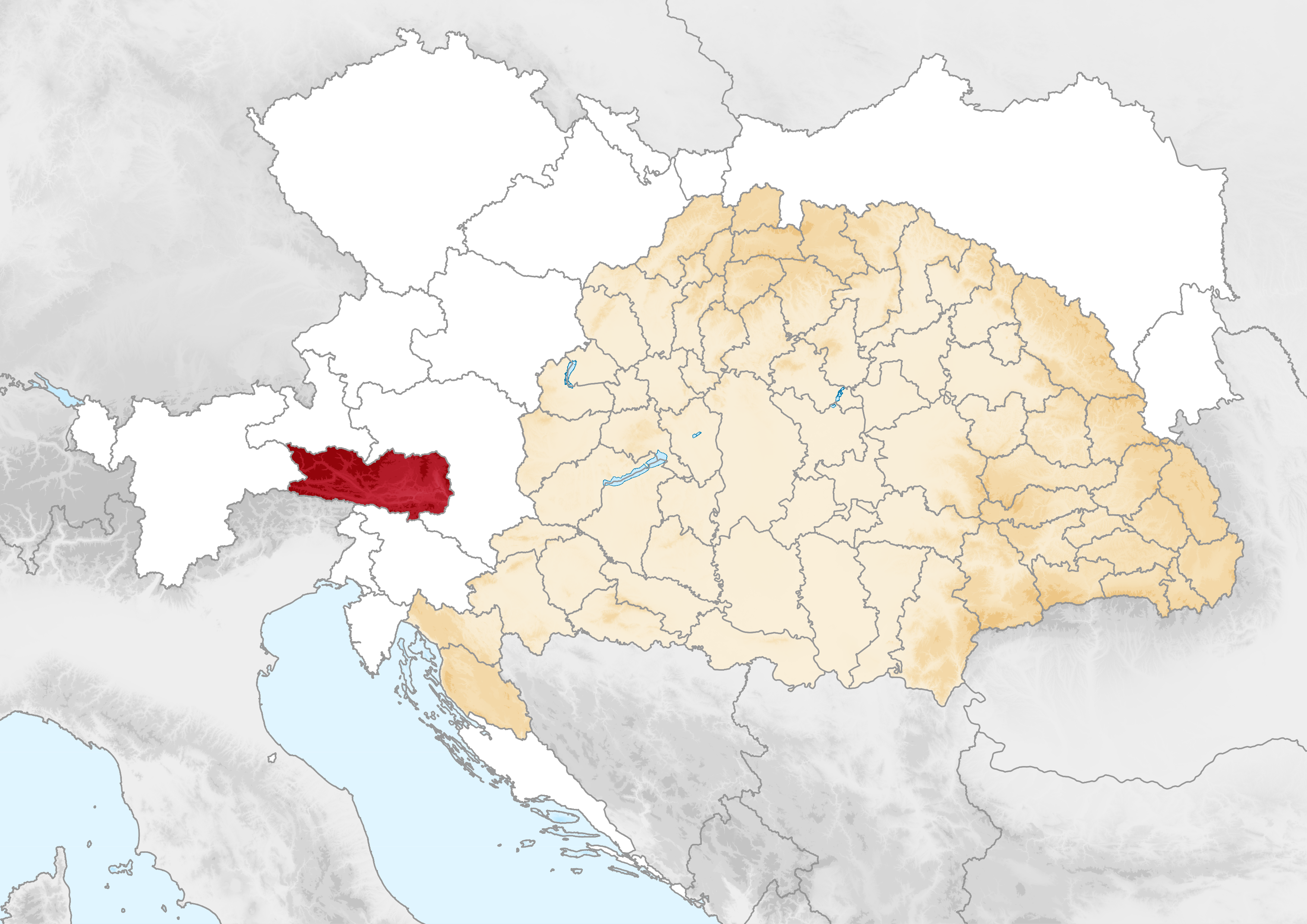 Carte de la Carinthie en 1914